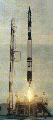 Image d'un lanceur du Programme Vanguard. Cette image provient du site